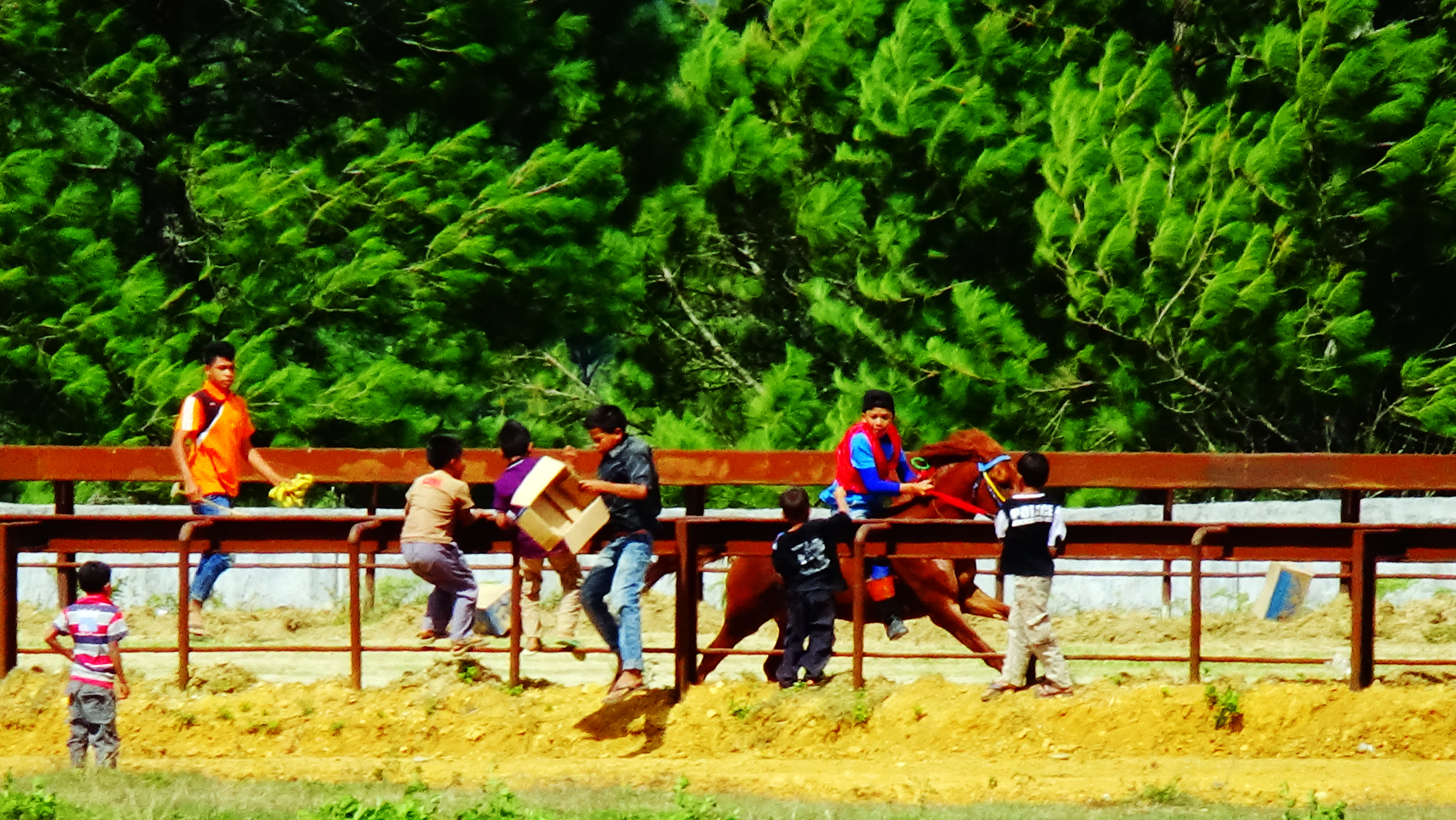 Tradisi yang menjadi budaya di dttran tingggi gayo, aceh